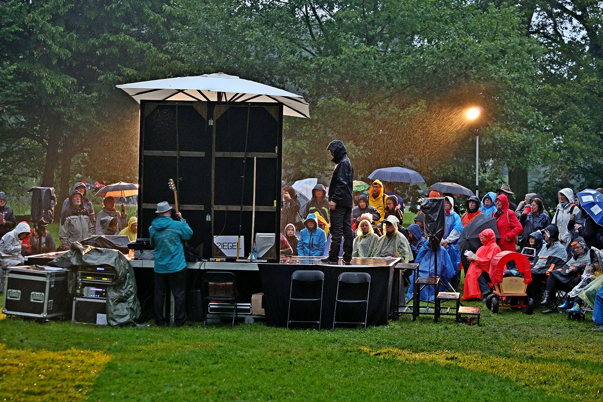 Bühne und Publikum im Regen, Kleines Fest im großen Park, Ludwigslust